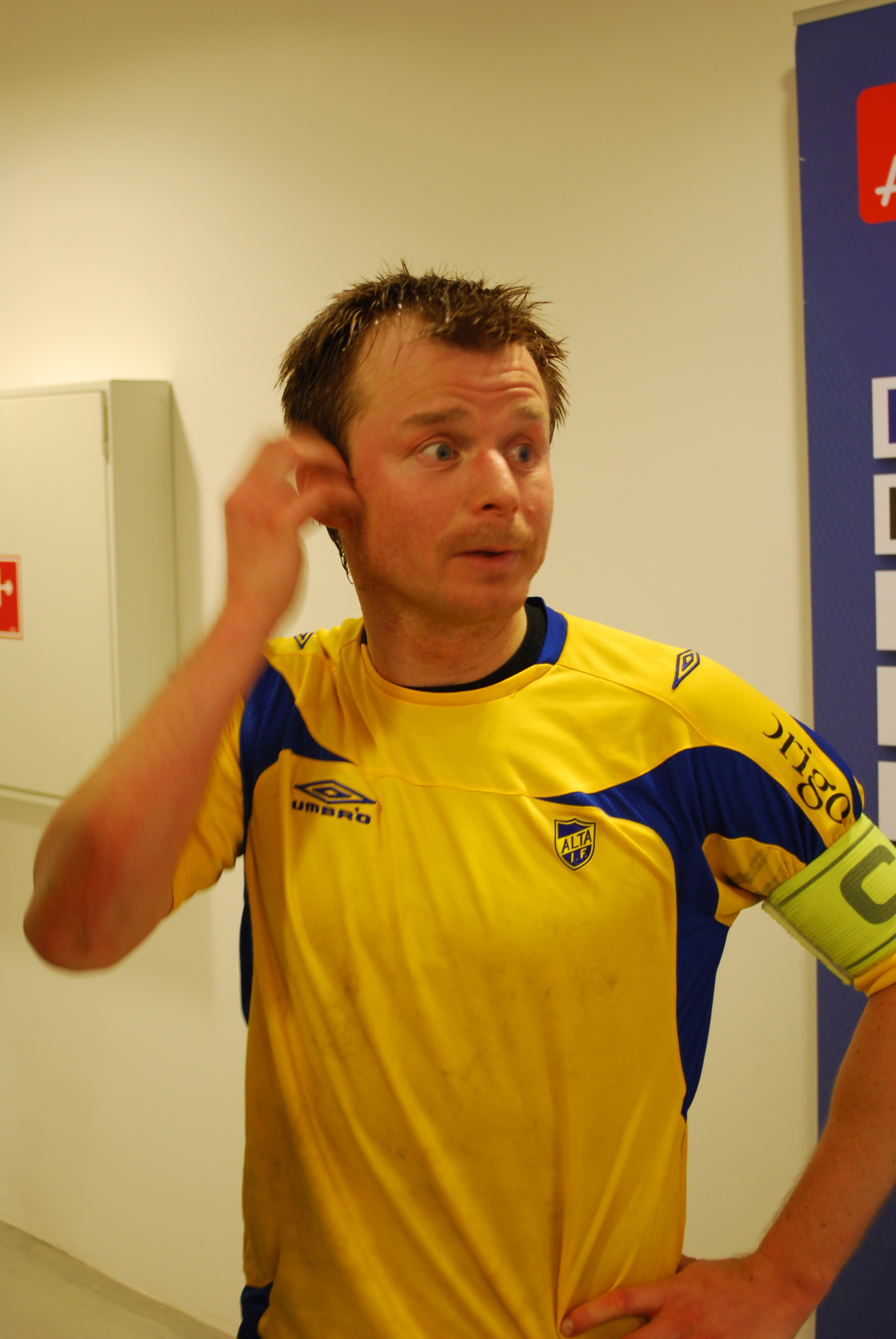 Jan Egil Brekke, fotballspiller hos Alta IF.